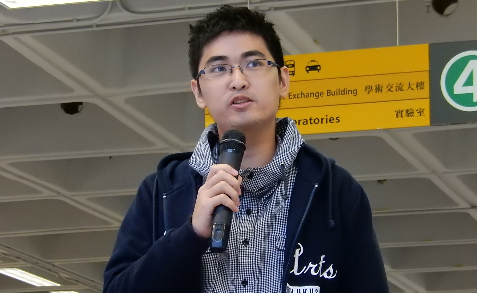 中文（香港）: 學聯秘書長周永康表示，為期79日的佔領運動「不成功、未失敗」。（美國之音湯惠芸攝）